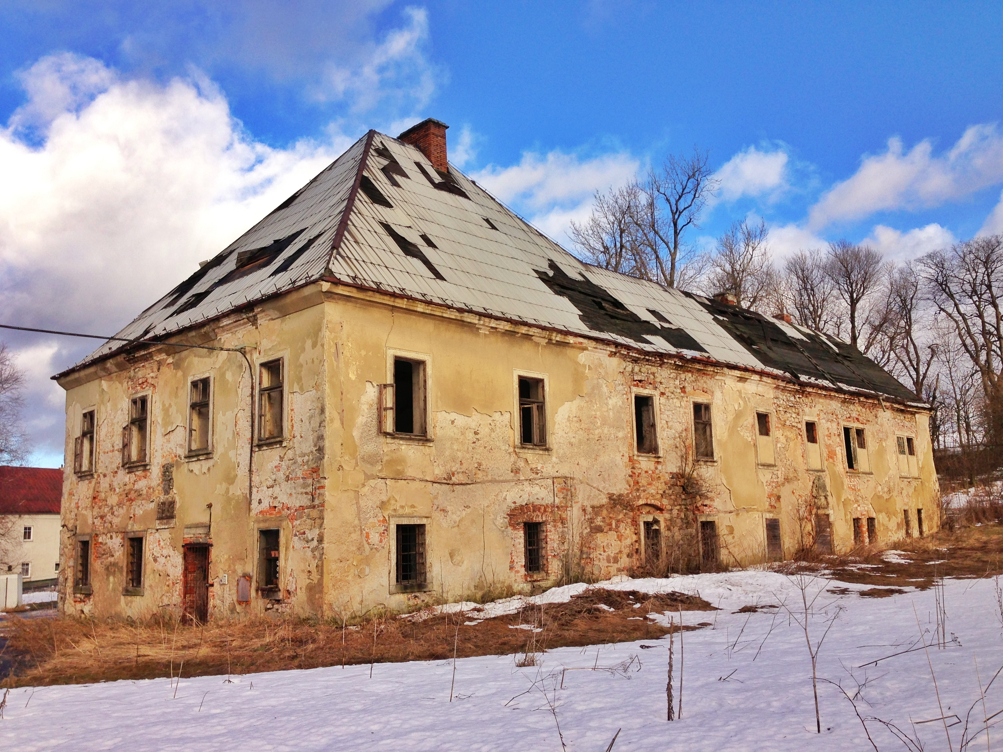 Barokní zámek v Krásném Lese v Krušných horách